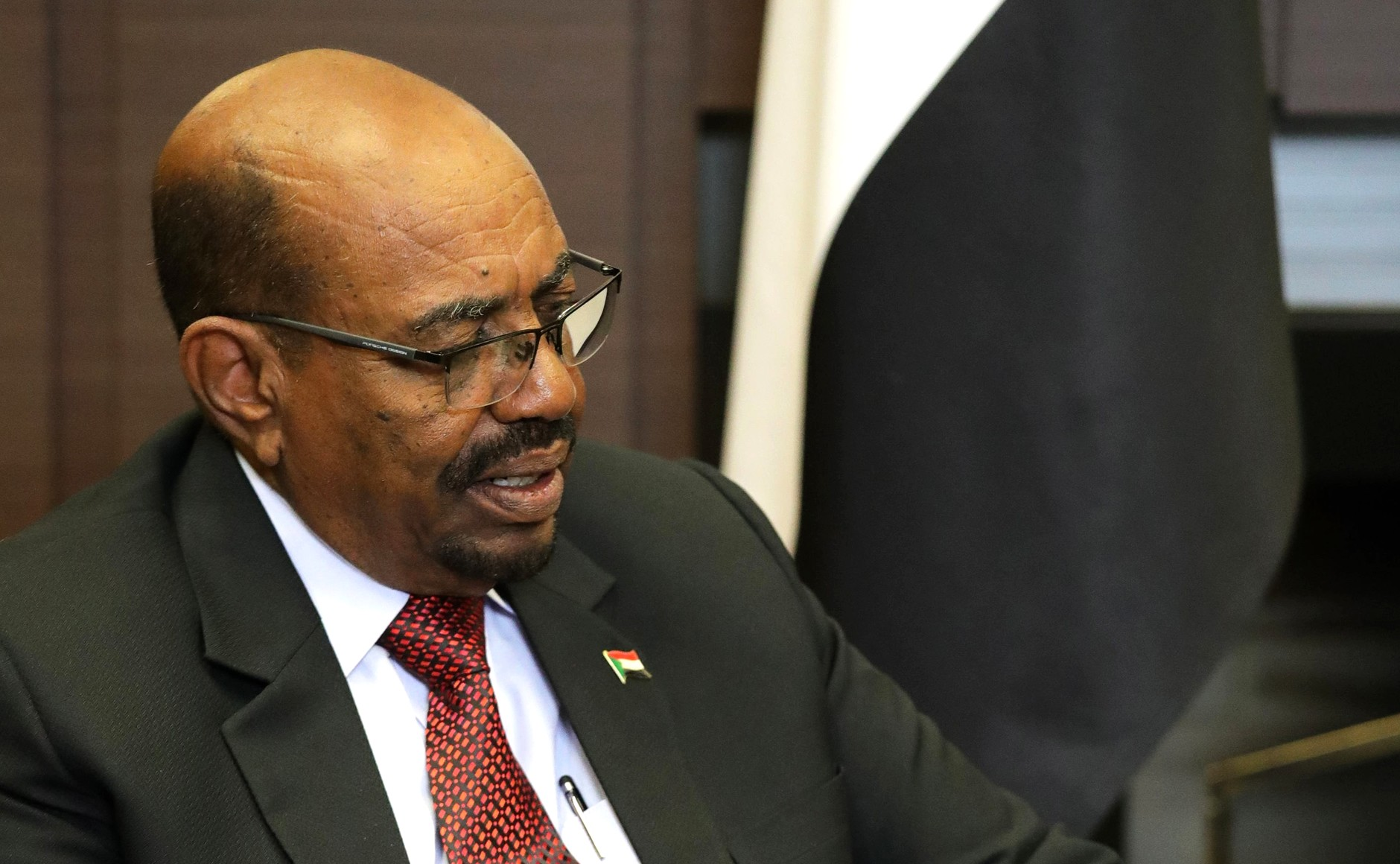 Президент Республики Судан Омар Башир во время встречи с Президентом России Владимиром Путиным